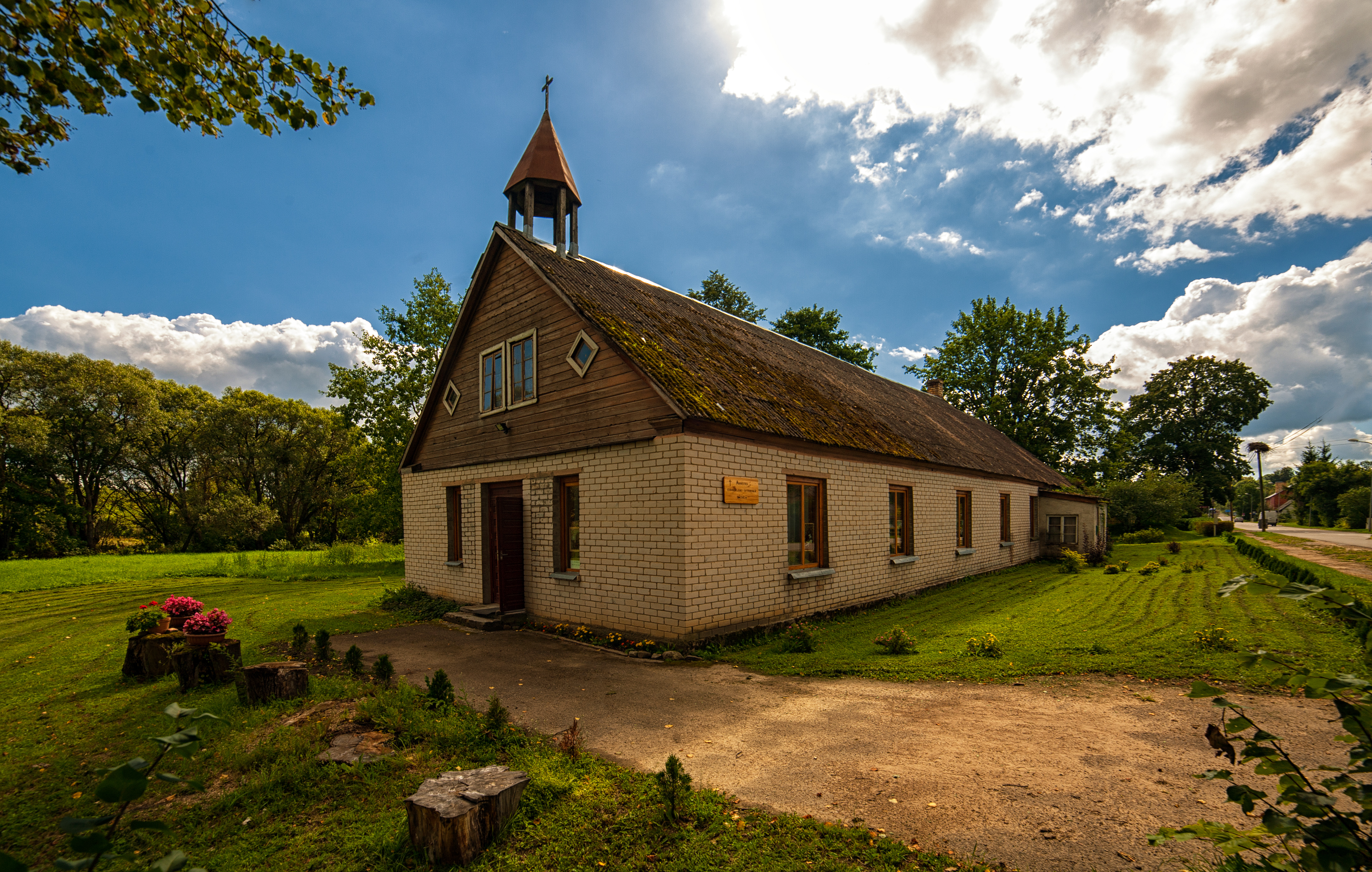 Aknīstes luteriskā baznīca